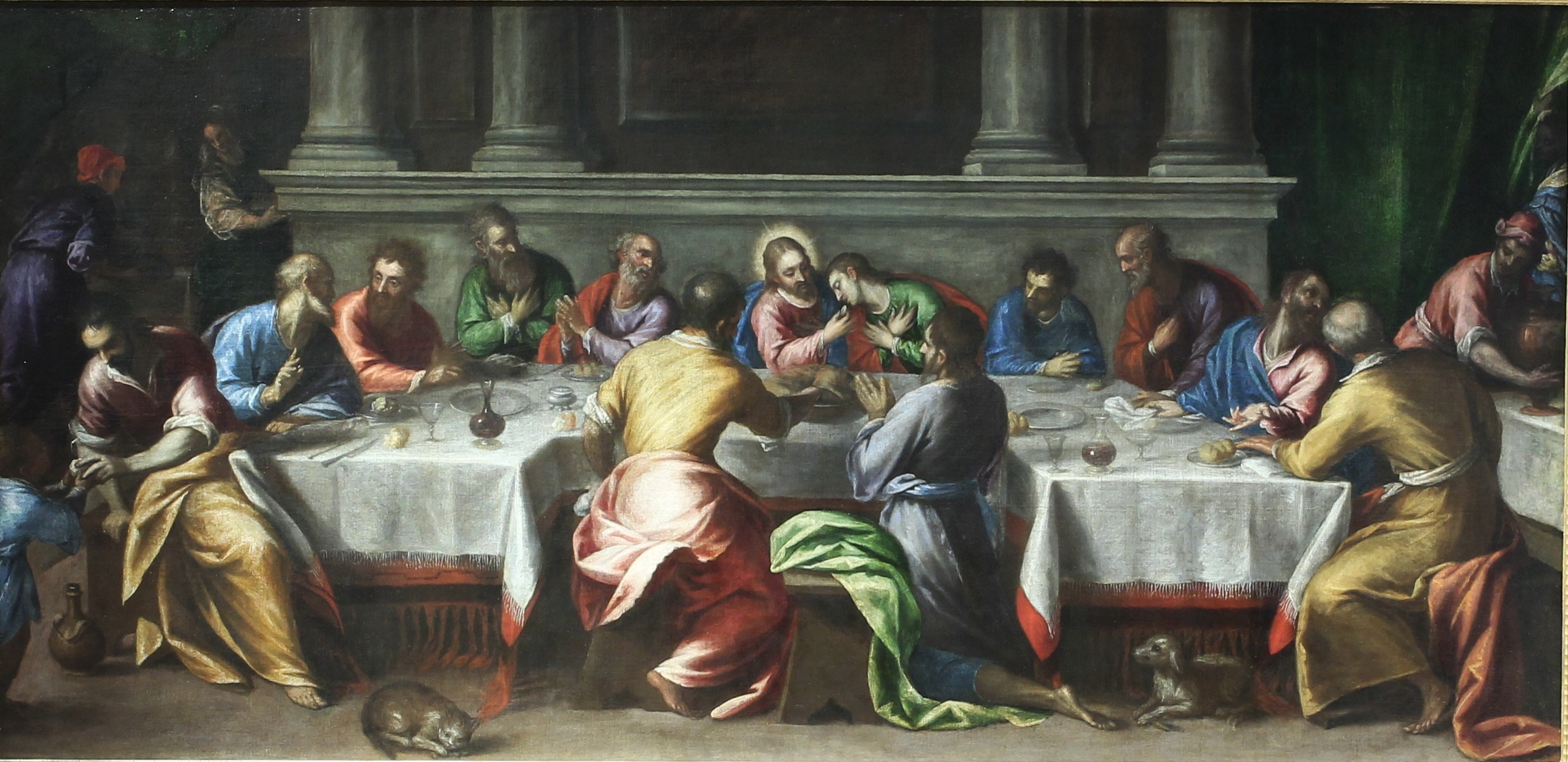 Jacopo Palma